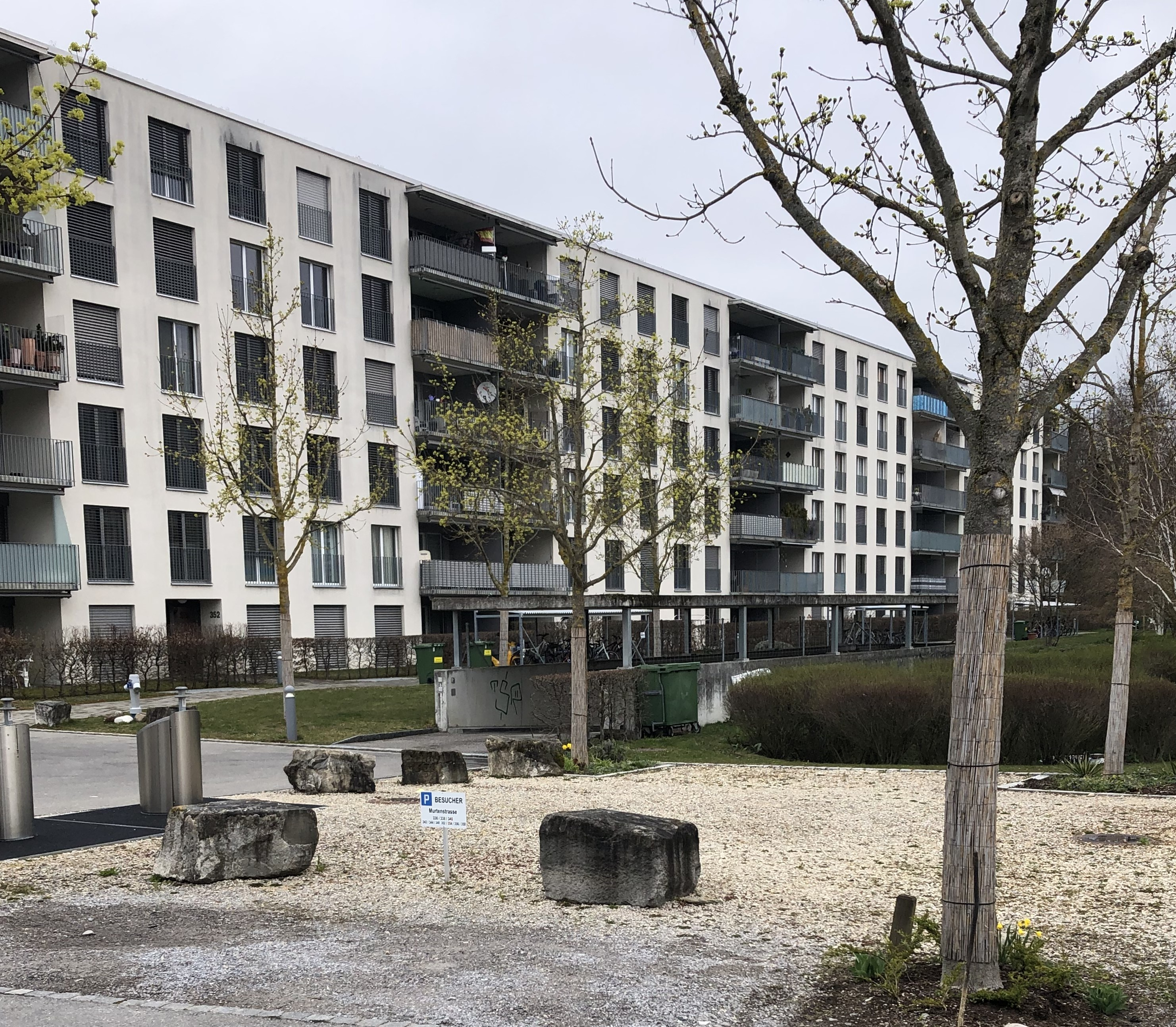 Ackerli Wohnbebauung